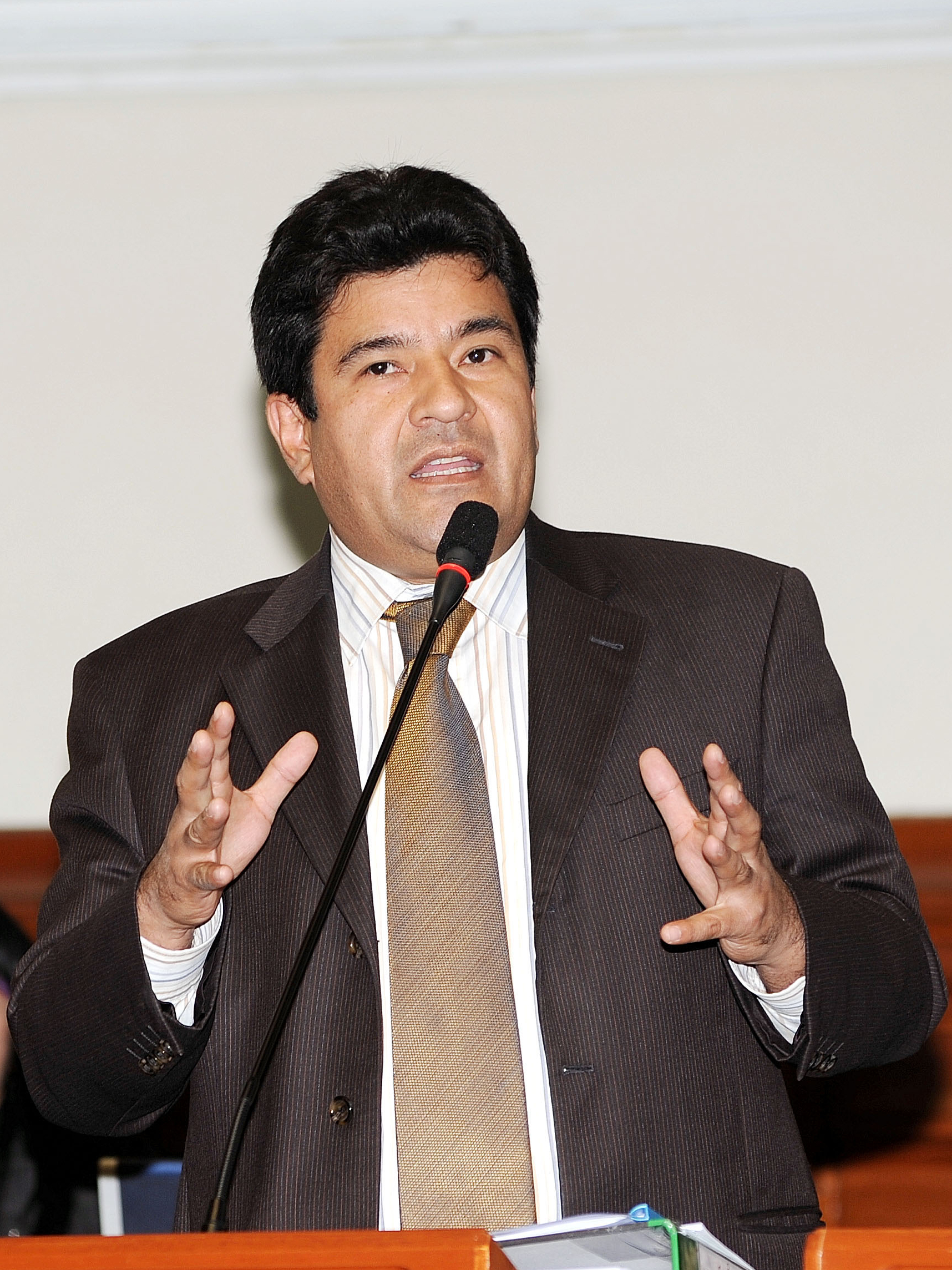 El legislador Rafael Yamashiro expresa su posición en el debate parlamentario realizado esta mañana por el Pleno congresal.